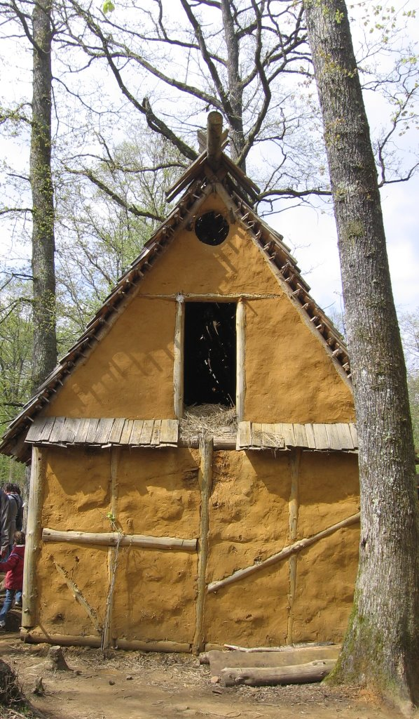 Maison en torchis au chantier médiéval de Guédelon